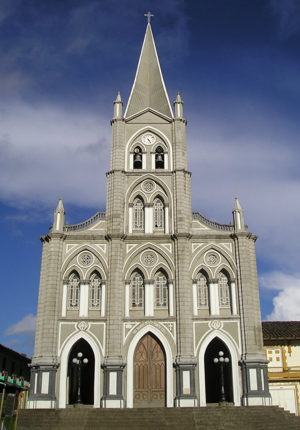 Fachada de la Iglesia de Caramanta, Antioquia, Colombia